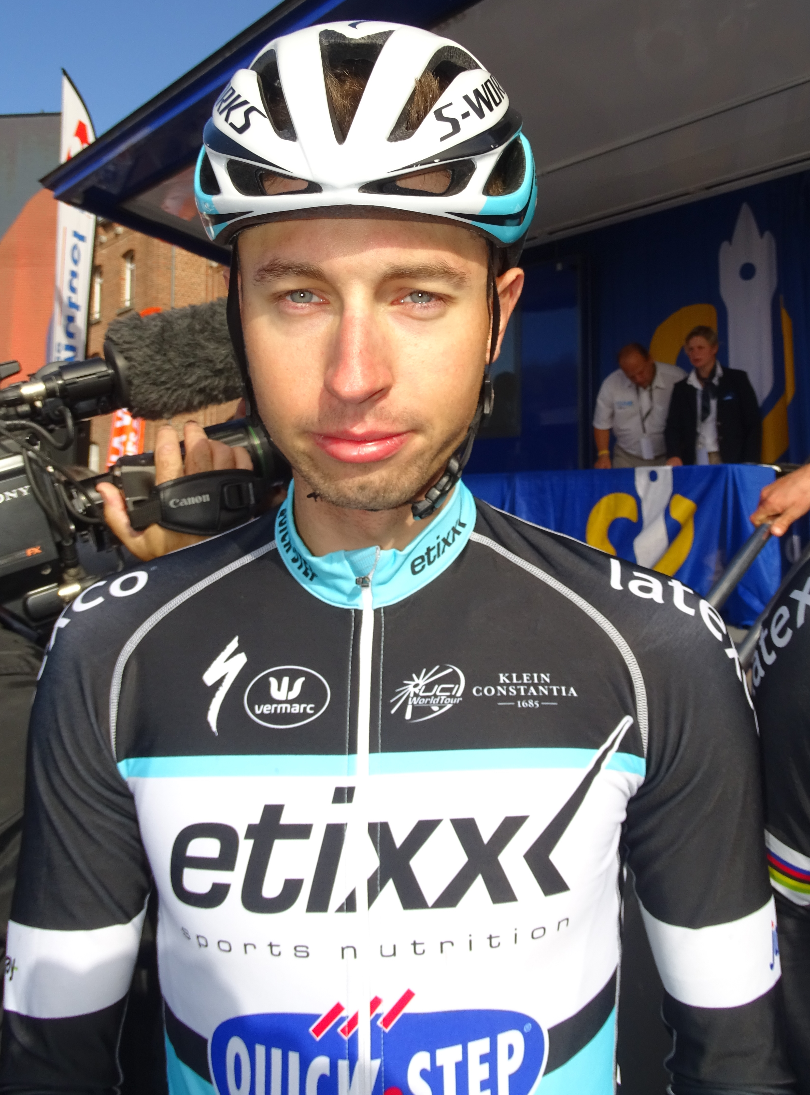 Reportage réalisé le dimanche 6 septembre à l'occasion du départ et de l'arrivée du Grand Prix de Fourmies 2015 à Fourmies, Nord-Pas-de-Calais, France.